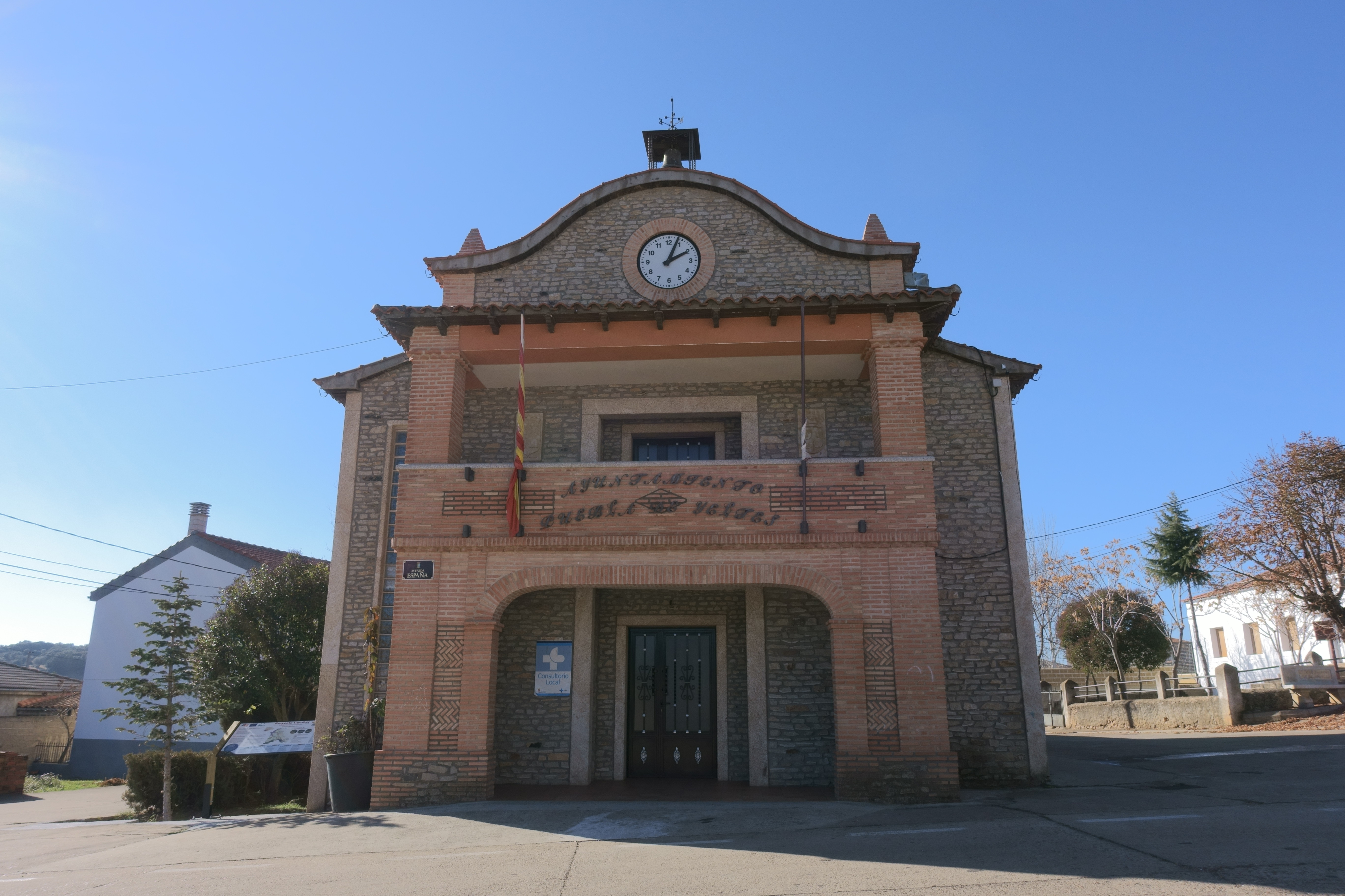 Casa consistorial de Puebla de Yeltes (Salamanca, España).